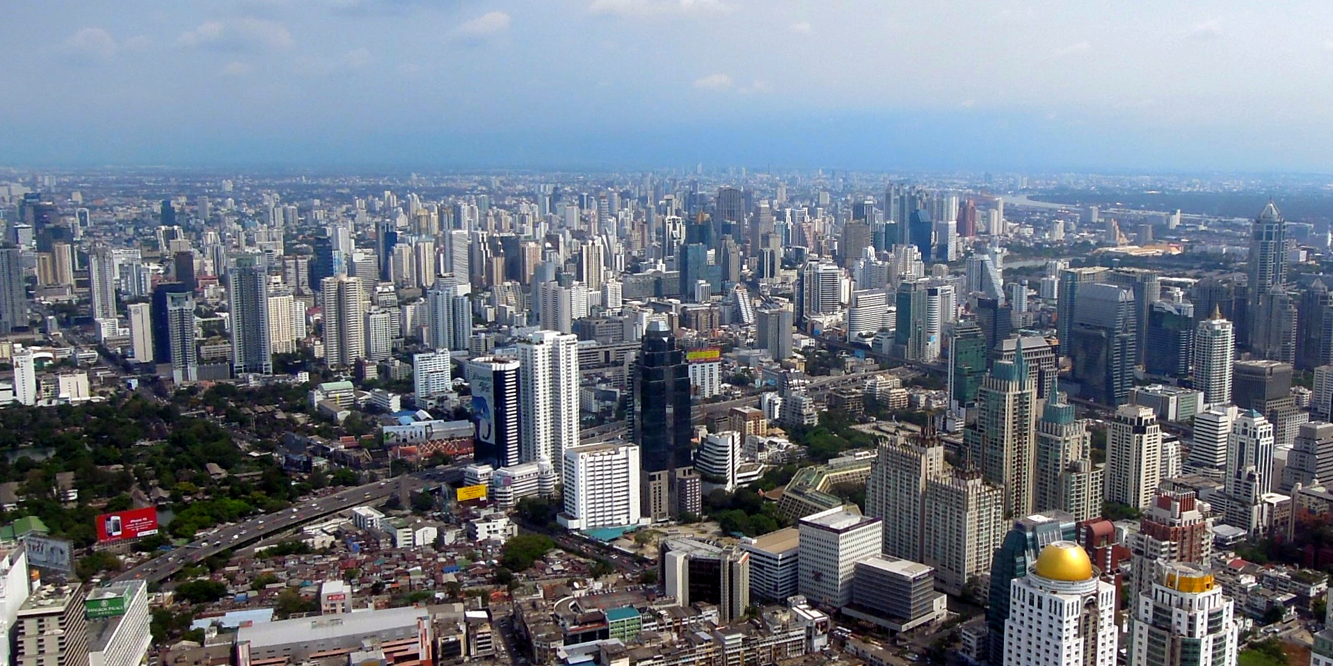 View from Baiyoke Sky Hotel, Bangkok